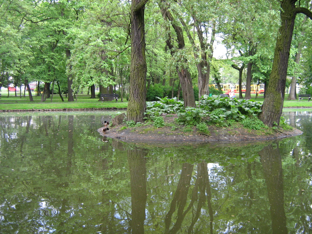 Park Sielanka Łódź